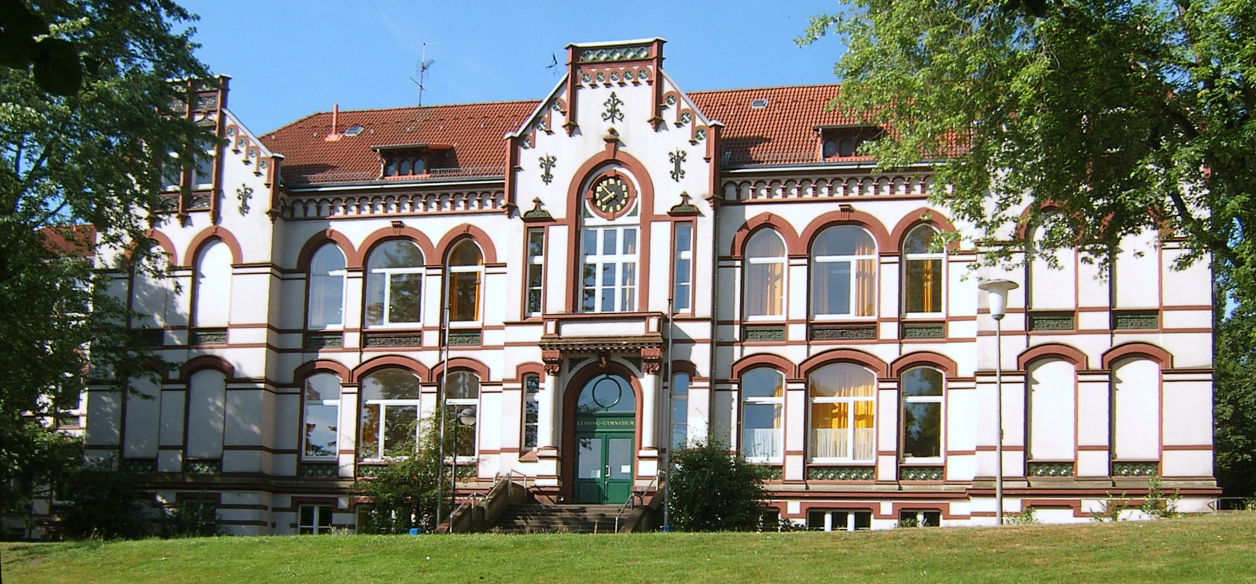 Hamburg, Harburg, Lessinggymnasium